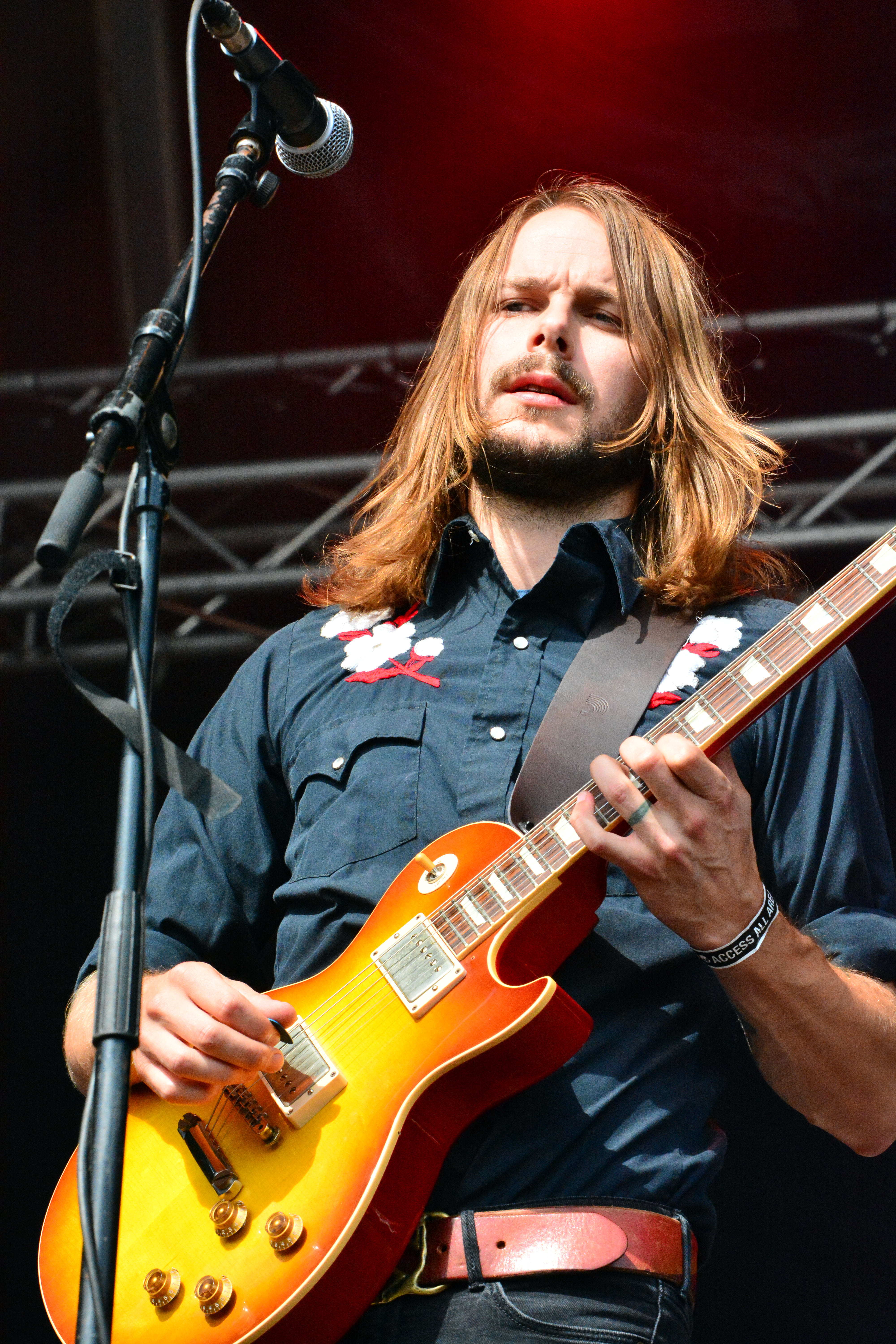 Jonatan Larocca Ramm von Graveyard beim Elbriot 2014